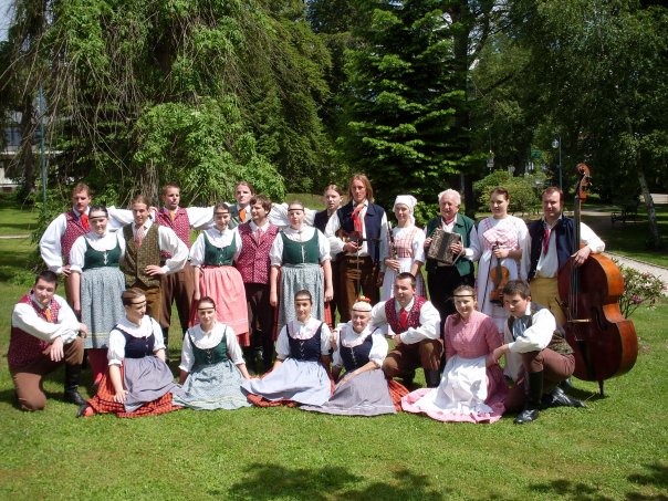 Součastnost